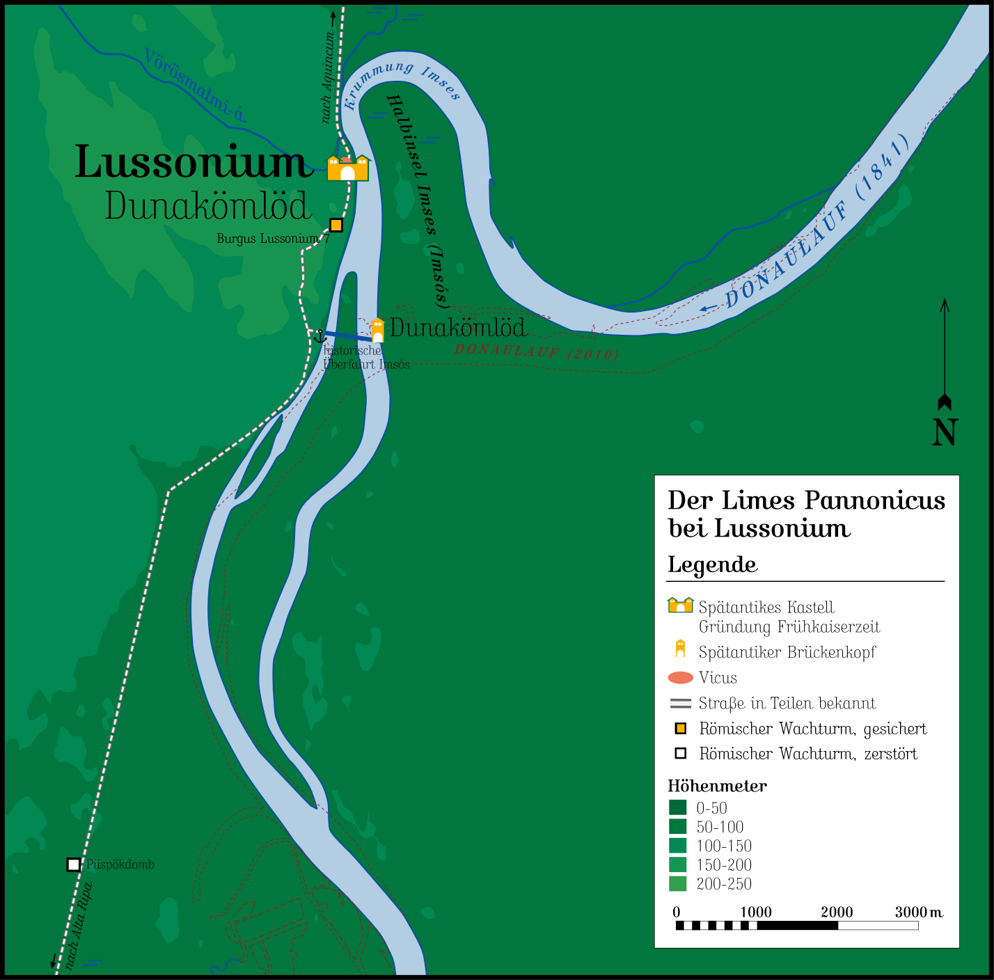 In Macromedia Freehand erstellte und mit Adobe Illustrator abgespeicherte Zeichnung zum Limes Pannonicus. Quellen: hauptsächlich Zsolt Visy (Theiss, 1988). Der Donaulauf wurde nach einer Landaufnahme von 1841 dargestellt und muß daher nicht mit den neuzeitlichen Flußlauf übereinstimmen. Aus derselben Quelle stammt der historische Flußübergang.